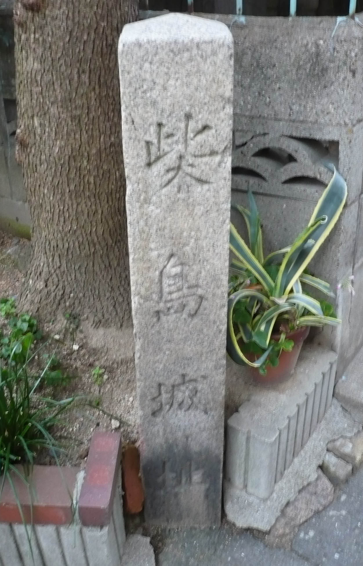 柴島城の石碑